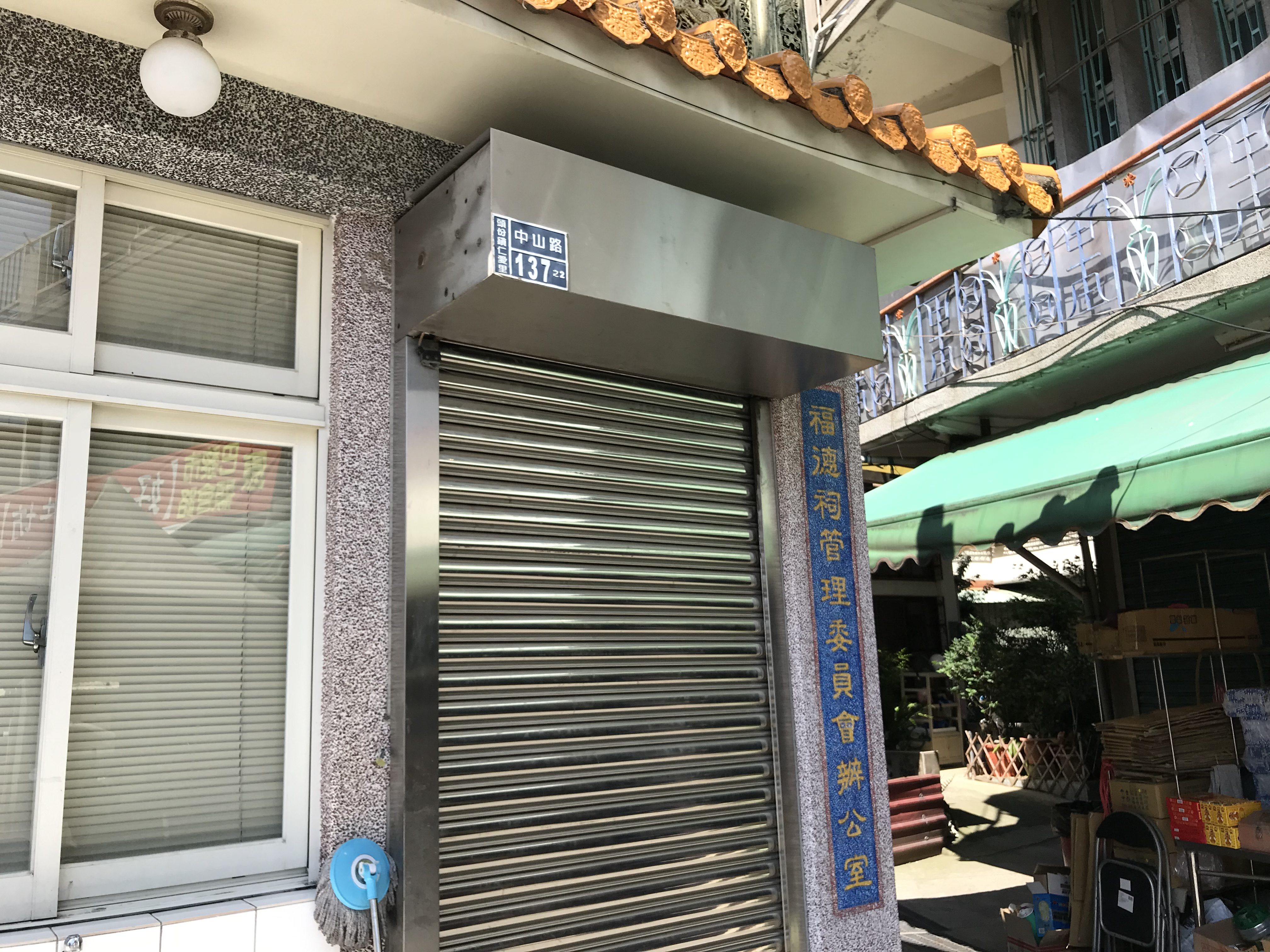 頭份福德祠門牌